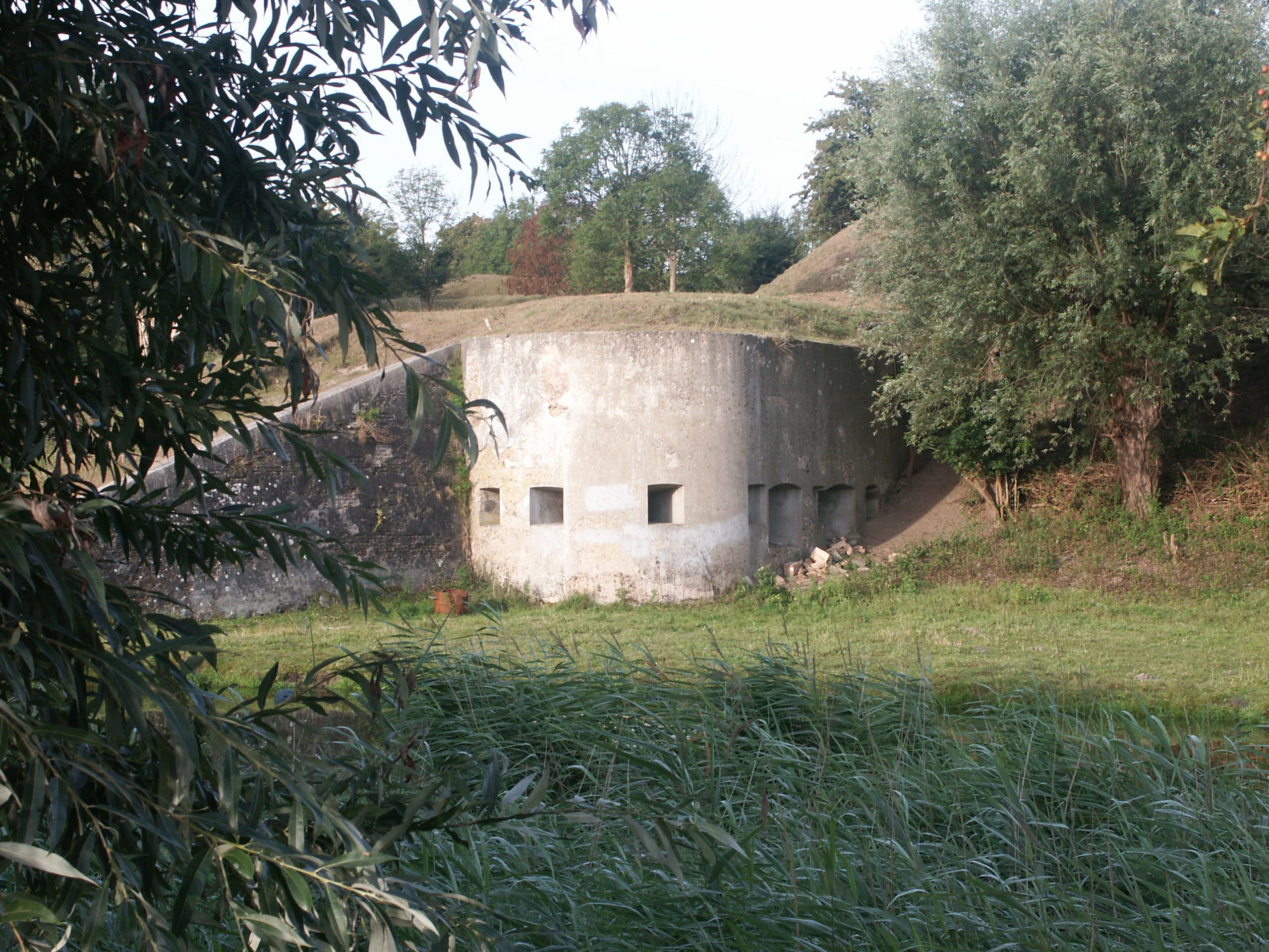 Afvuurplaats onderdeel fort Sabina Henrica